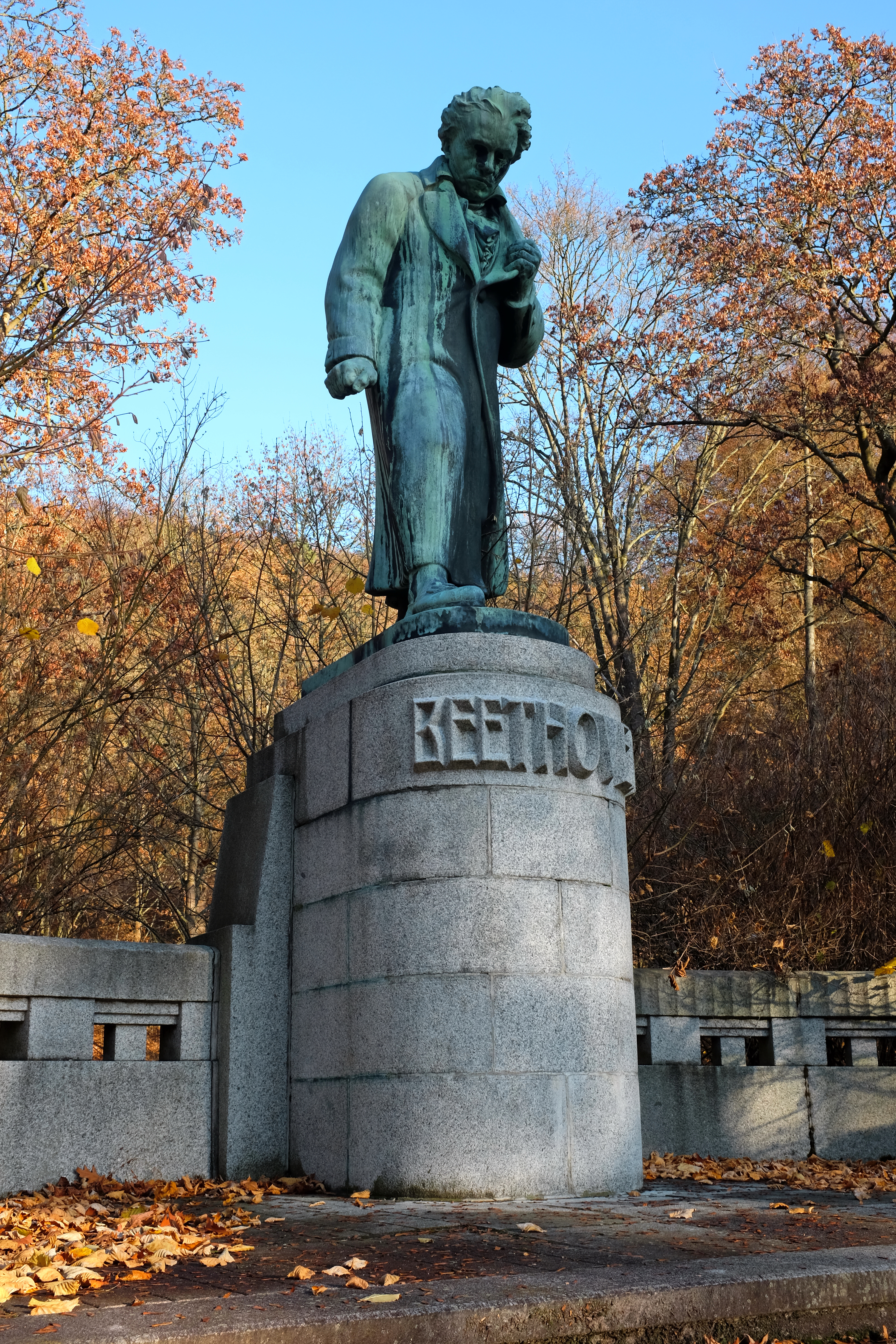 Pomník Ludwiga van Beethovena, park za Poštovním dvorem, parc. 793/1, Karlovy Vary.